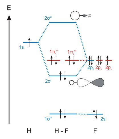 Diagramme d'OM du fluorure d'hydrogène